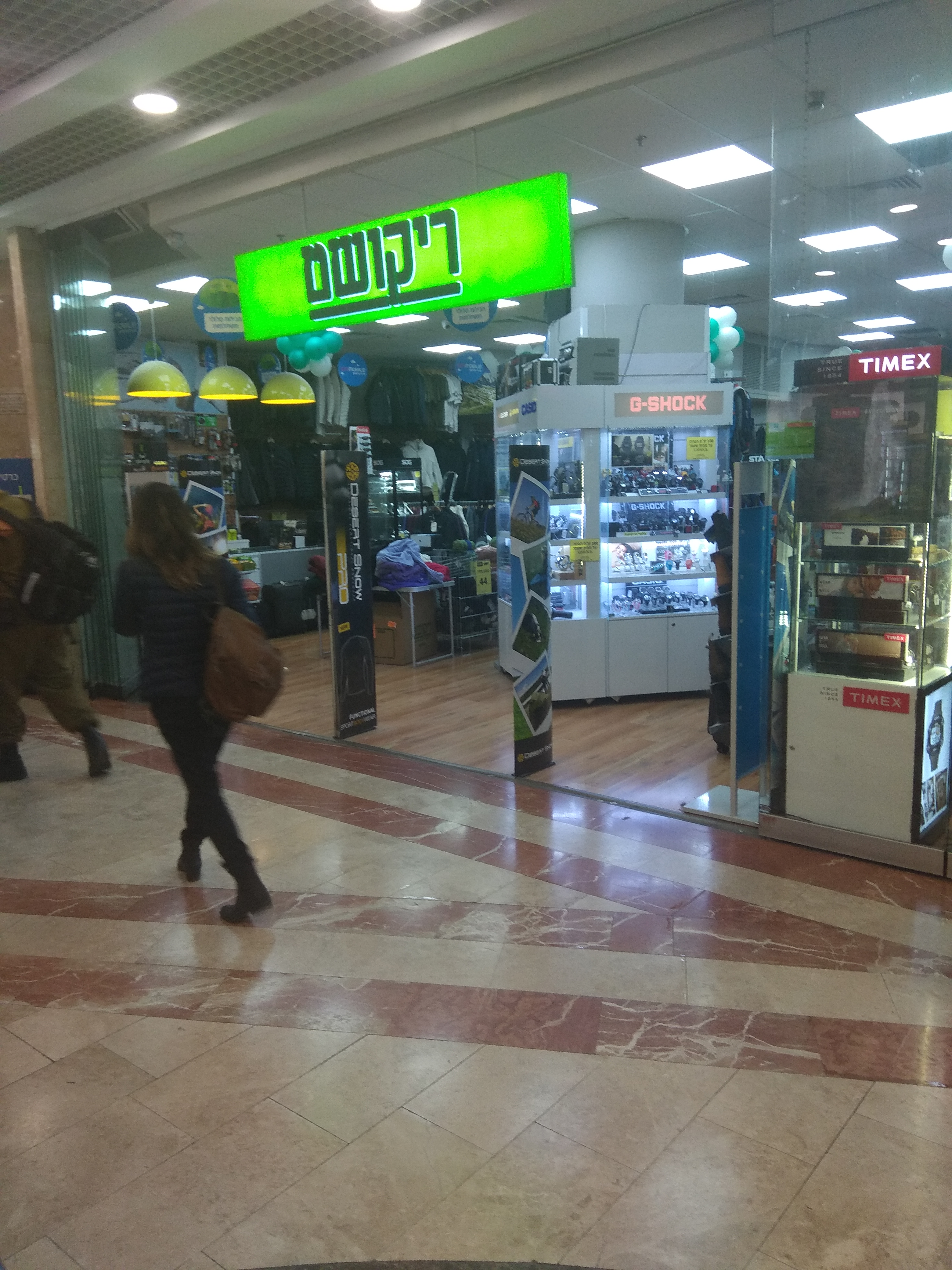 סניף ריקושט בקניון עזריאלי תל אביב